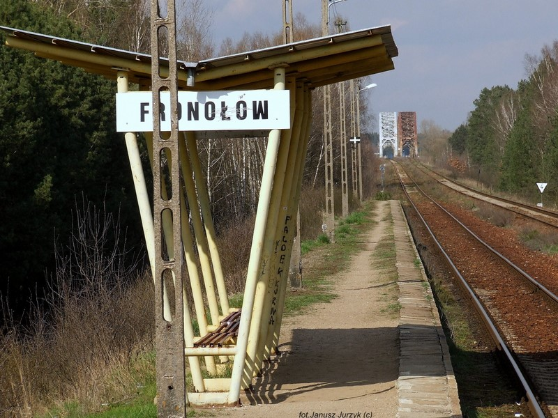 Fronołów